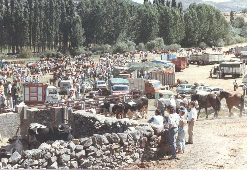 Fería de Villafranca de la Sierra (13 de julio de 1986).(Ávila, España). Autor: C3PO